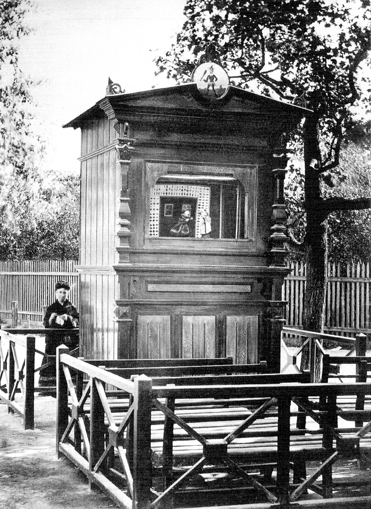 Das Wursteltheater der Barbara Fux (es existierte vermutlich von 1834 bis 1900) im Wiener (Wurstel-)Prater; Albuminpapier auf Untersatzkarton